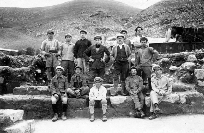 חושפי ריצפת בית הכנסת, שלט:"אסור להכנס לתוך תעלת החפירות לצלם צלומים או להזיז משהו ממקום החפירה, בפקודת מחלקת העתיקות" בעומדים שני מימין (עם שפם) מנהל החפירה פרופ' ליפא סוקניק; 1928 - חפציבה-1